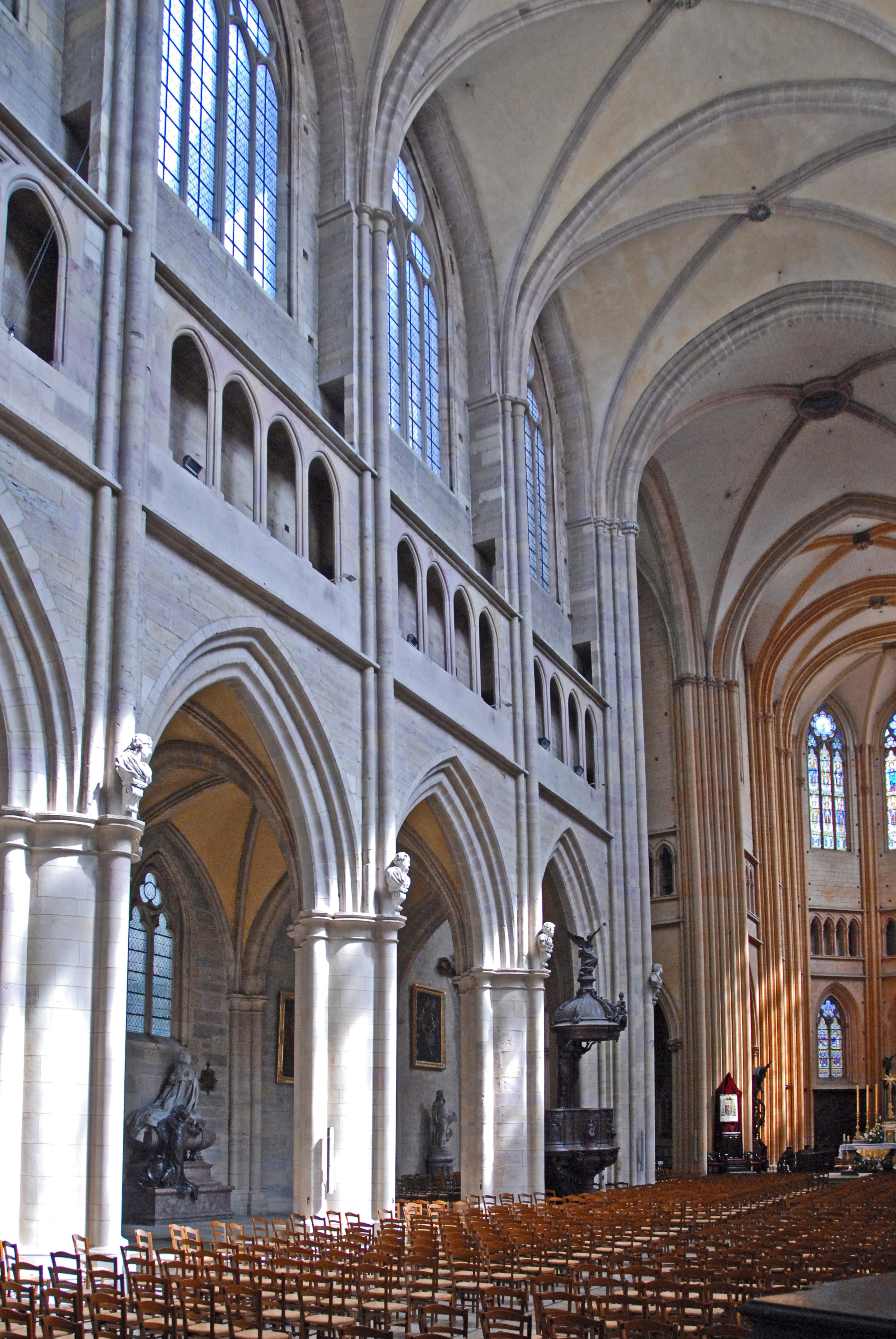 St-Bénigne, Mittelschiff Nordwand